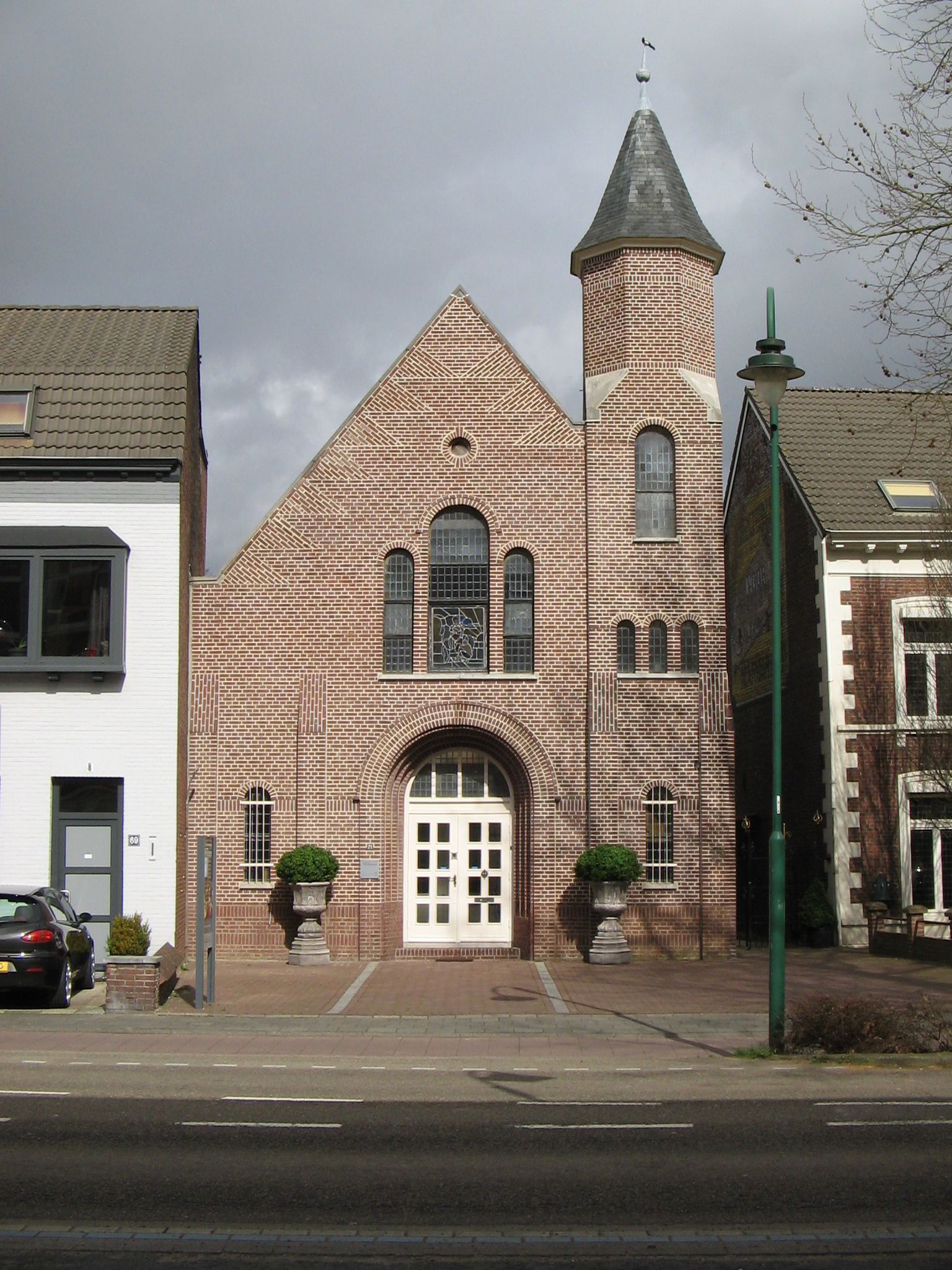 Joost Klarenbeek (1877-1961) en Joost Klaarenbeek (1907-1994). Voormalig Gereformeerde kerk Oos Kirk (onze kerk), Kapellerlaan 71, Roermond. 1920-1921.